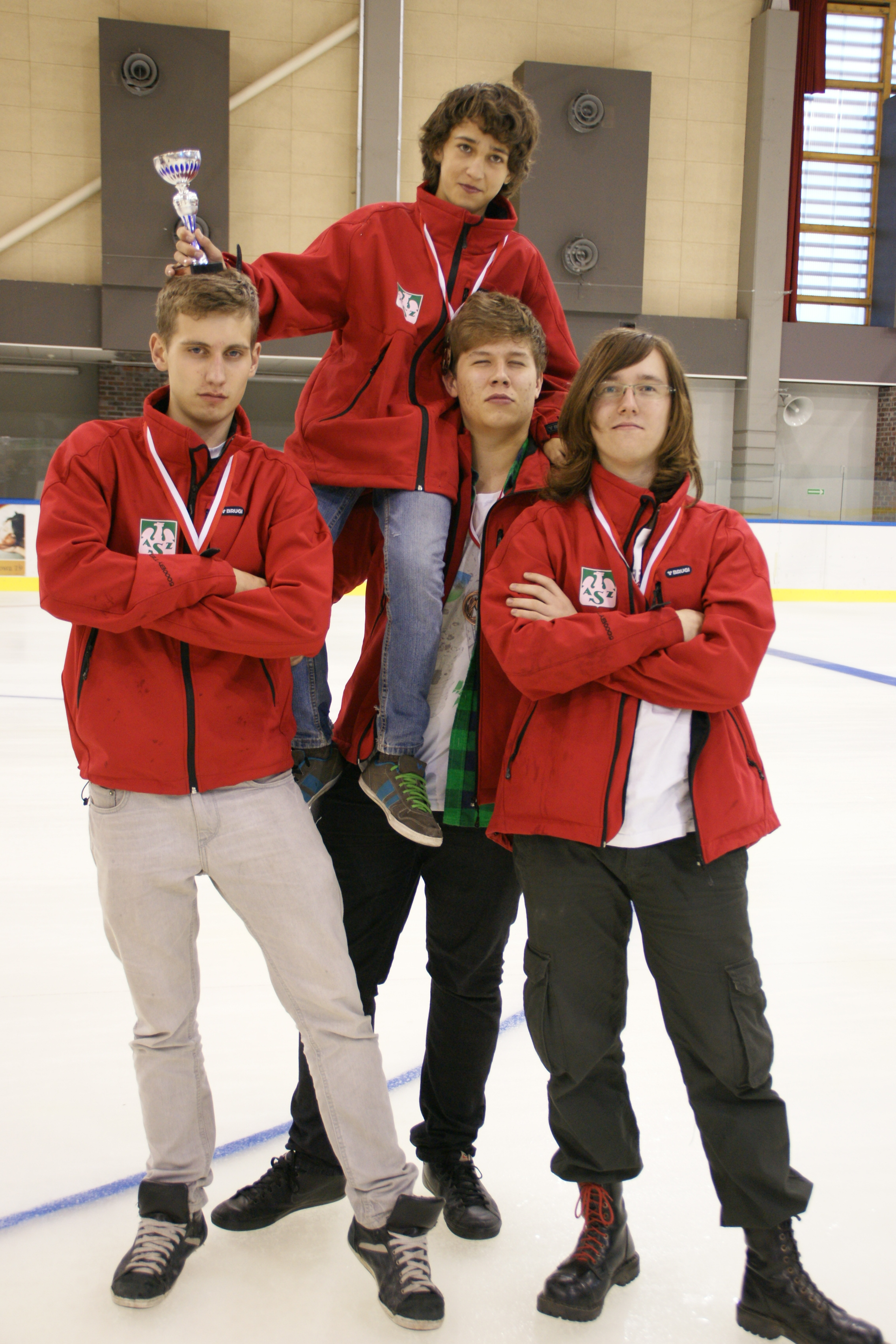 Od prawej: T.Pluta (s), K. NIewiński, A.Kolano, T. Bosek